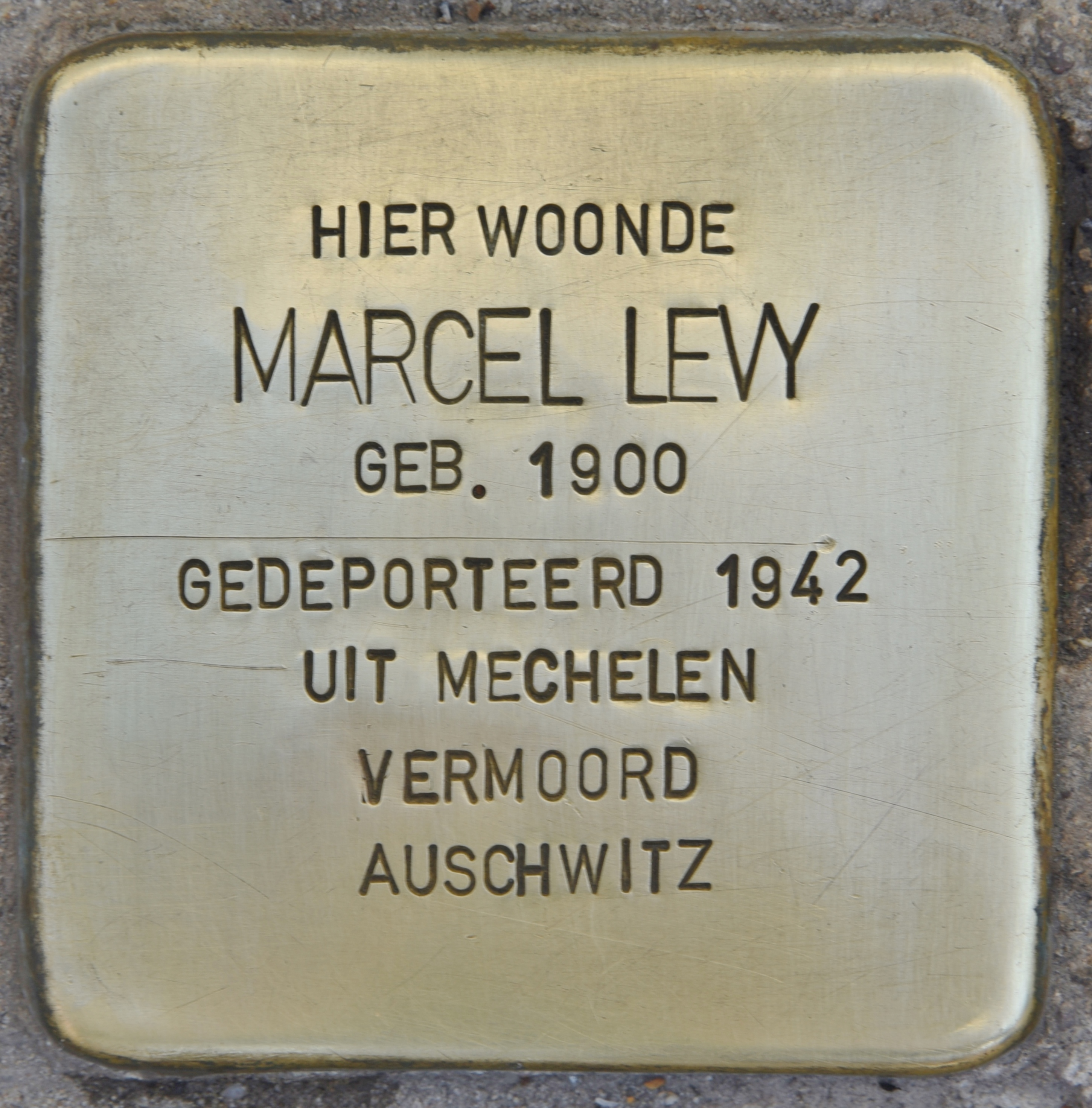 Stolperstein für Marcel Levy